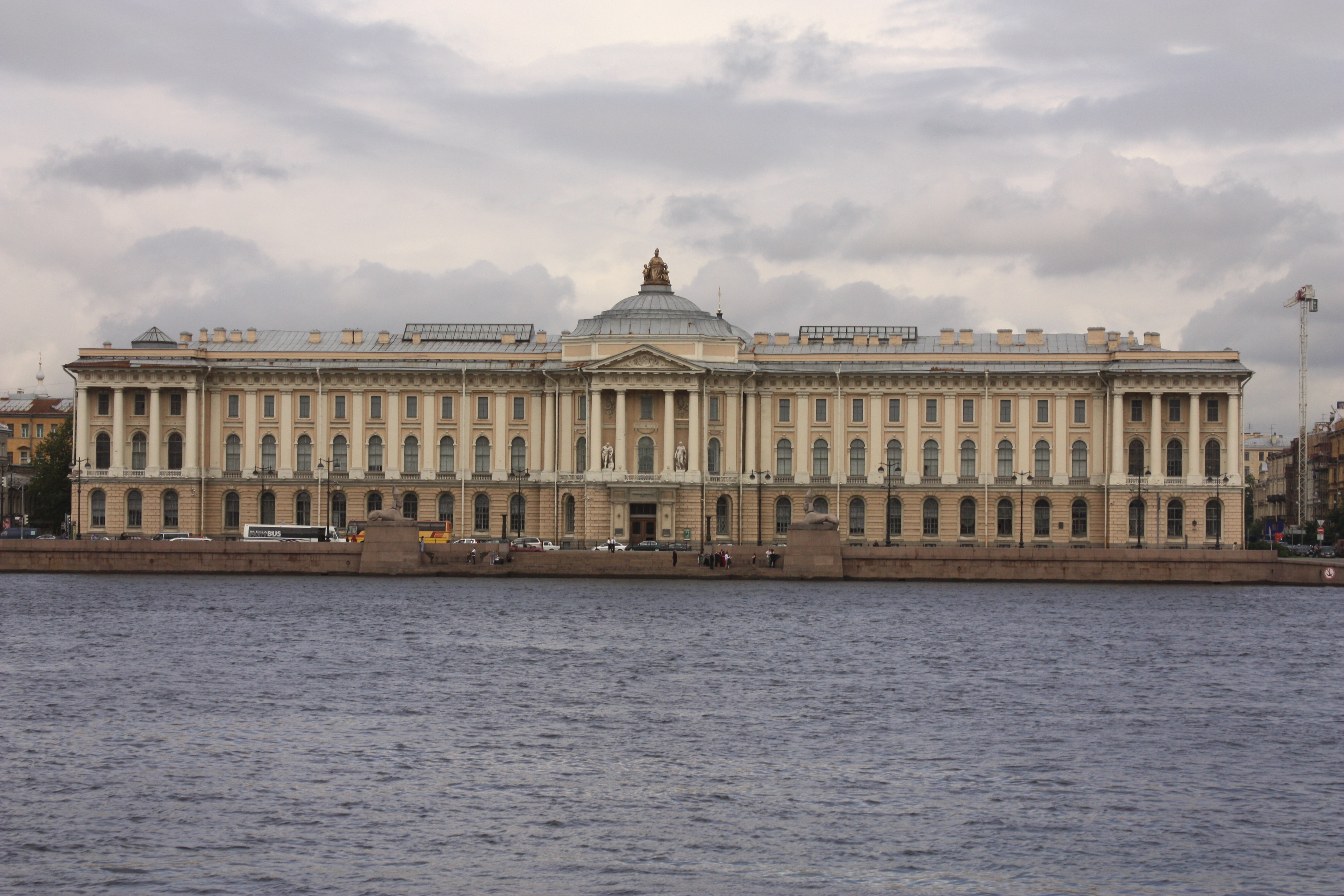 Sankt Petersburg; 2009; Touristenfotos